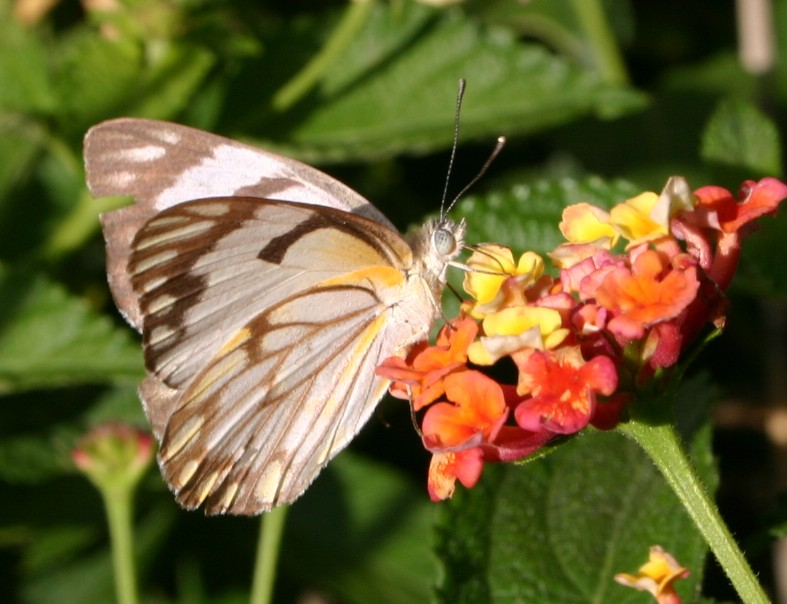 Belenois aurota